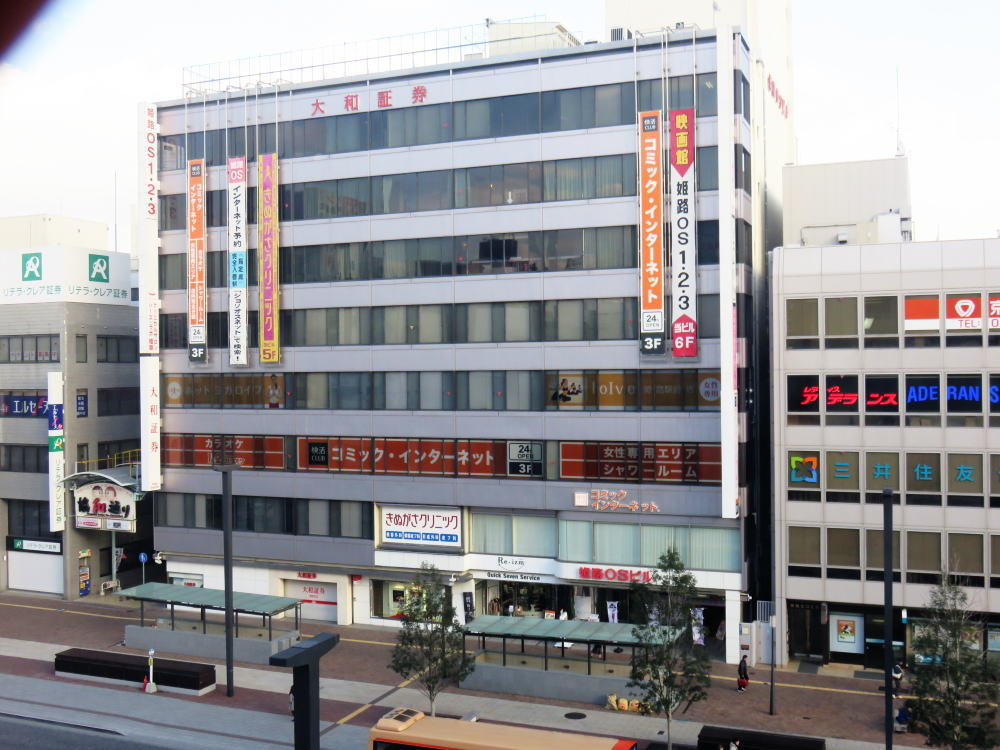 兵庫県姫路市にある姫路ＯＳビル。